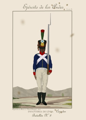 Cazador del Batallón 8 de Infantería del Ejército de los Andes